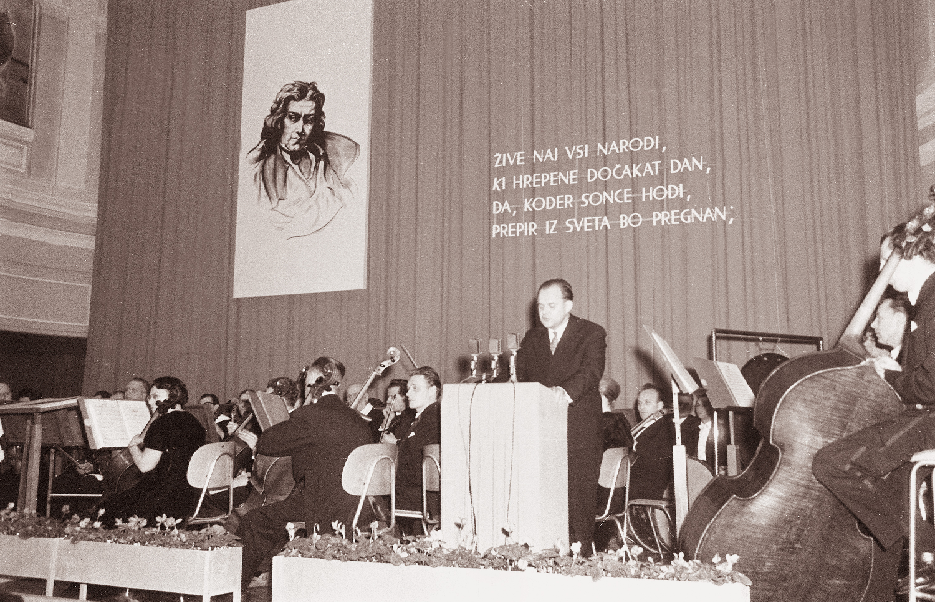 Podelitev Prešernovih nagrad. Koncert Simfoničnega orkestra Slovenske filharmonije.